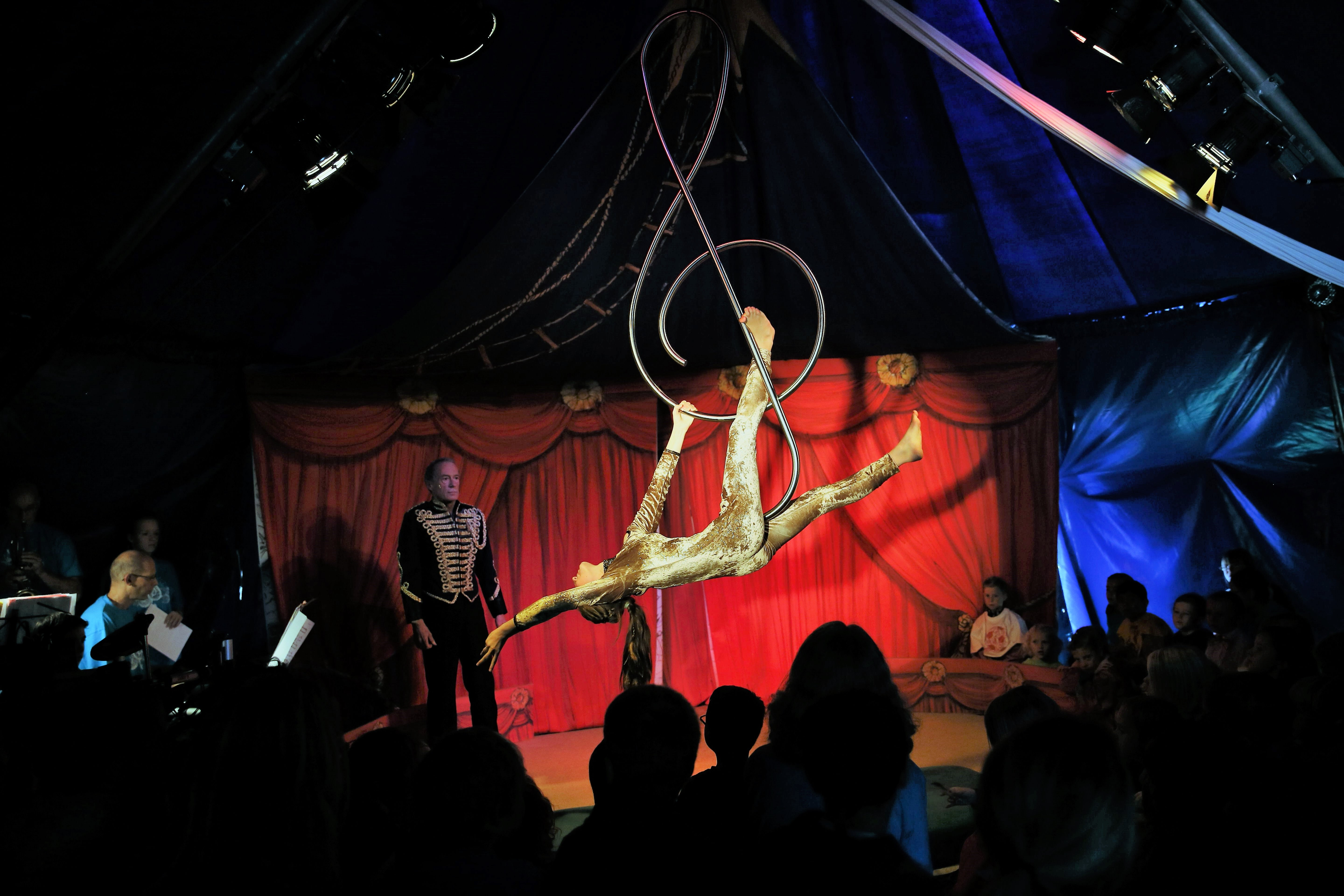 Circusical ist eine Mischung von Zirkus und Musical, die erstmals 2015 in Zirkus Otelli aufgeführt wurde. Das Bild zeigt mit dem Notenschlüssel und der Zirkusakrobatik symbolhaft die Mischung dieser beiden Kunstgattungen.